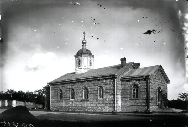 Цёплая Ефрасіннеўская царква Спаса-Ефрасіннеўскага манастыра. Полацк Беларуская (тарашкевіца): Полацак (Połacak), Спас (Spas). Цёплая царква